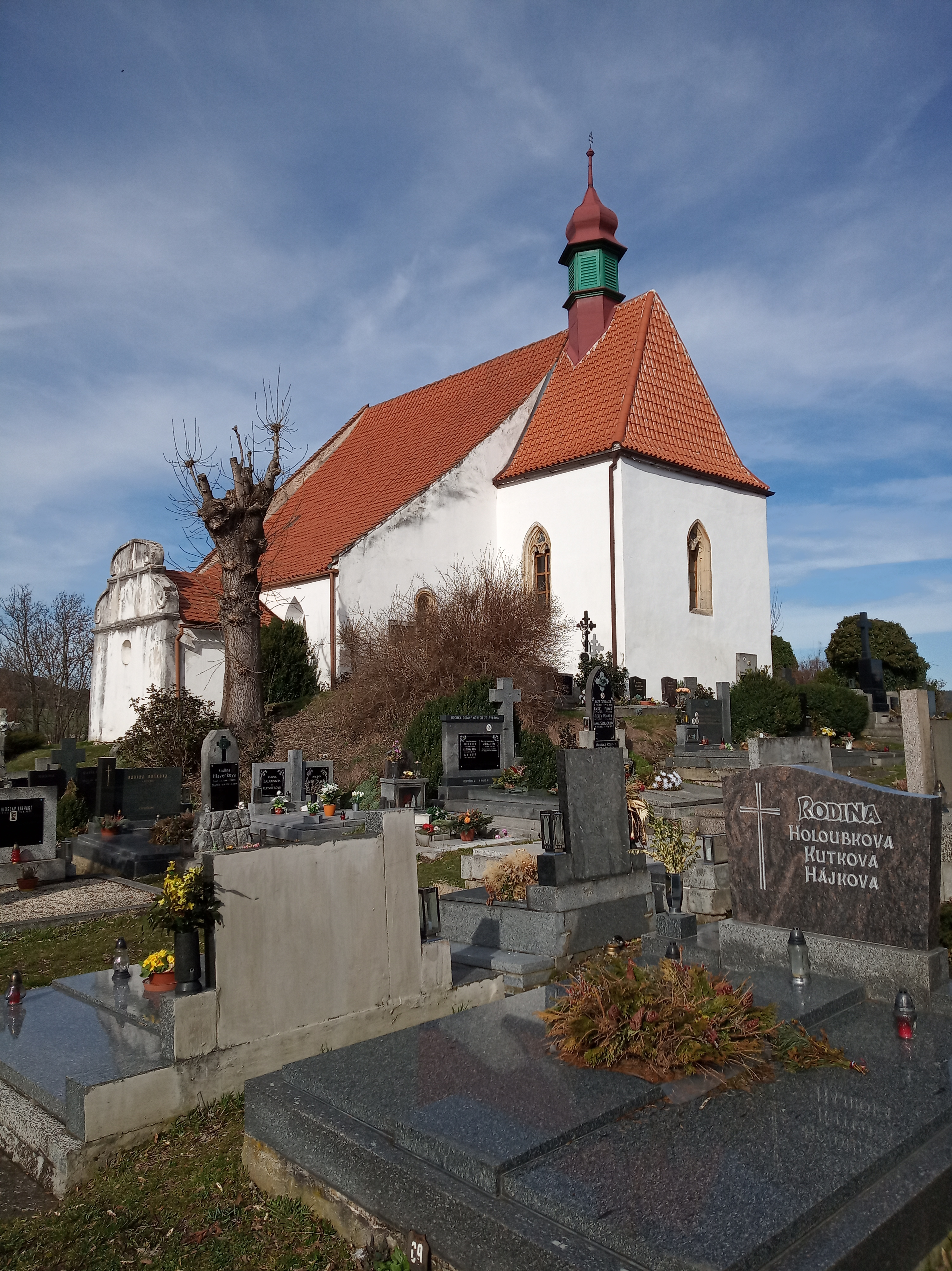 Kostel sv. Jiljí Švihov